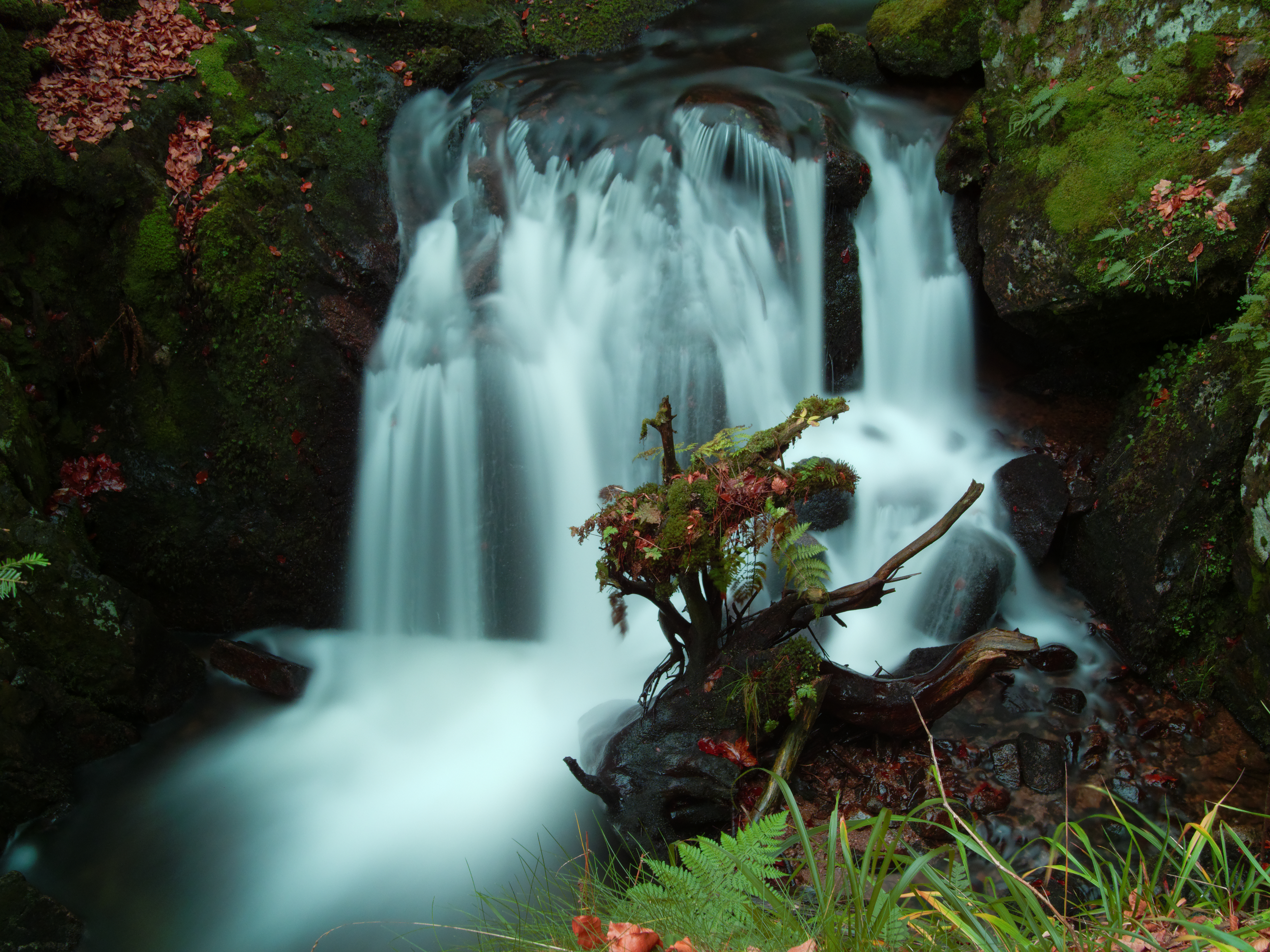 Cascade de la Savoureuse, à Lepuix. Photo réalisée avec un filtre ND16.